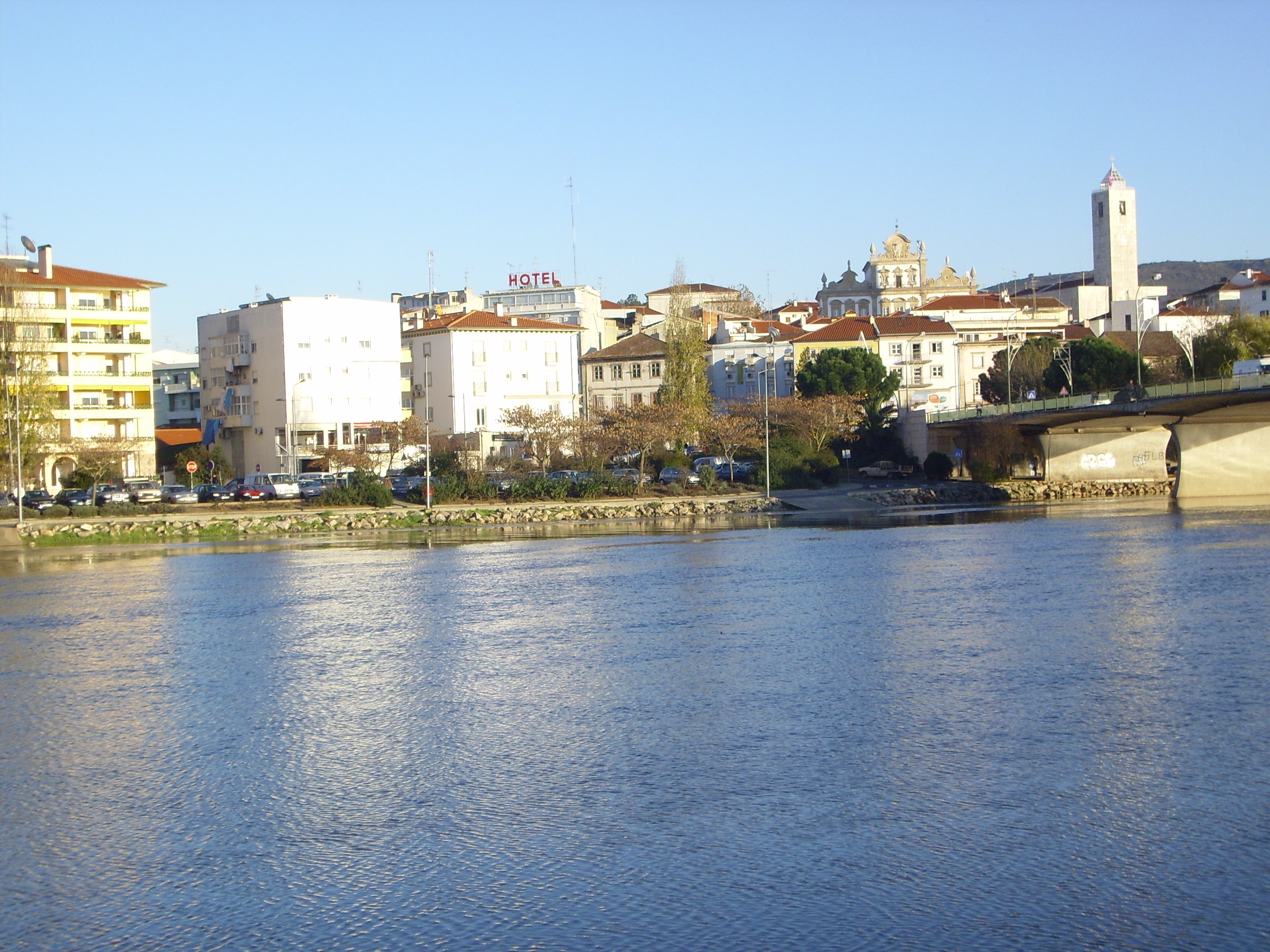 Mirandela